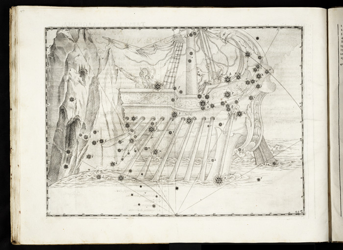 La constelacion de Argo Navis en la obra Uranometria